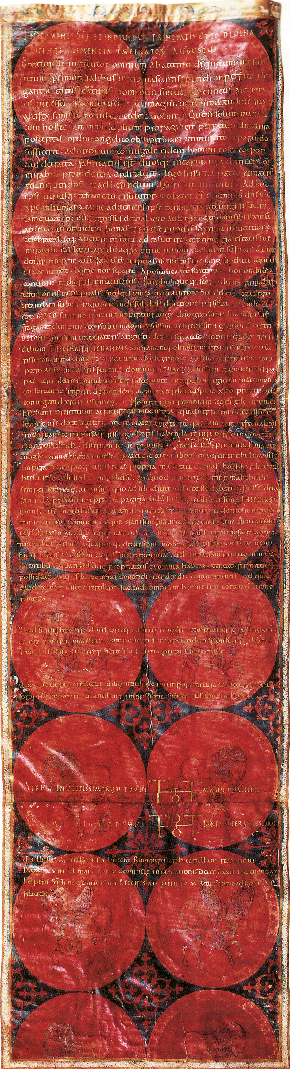 Heiratsurkunde von Otto und Theophanu (Niedersächsisches Staatsarchiv 6 Urk. 11